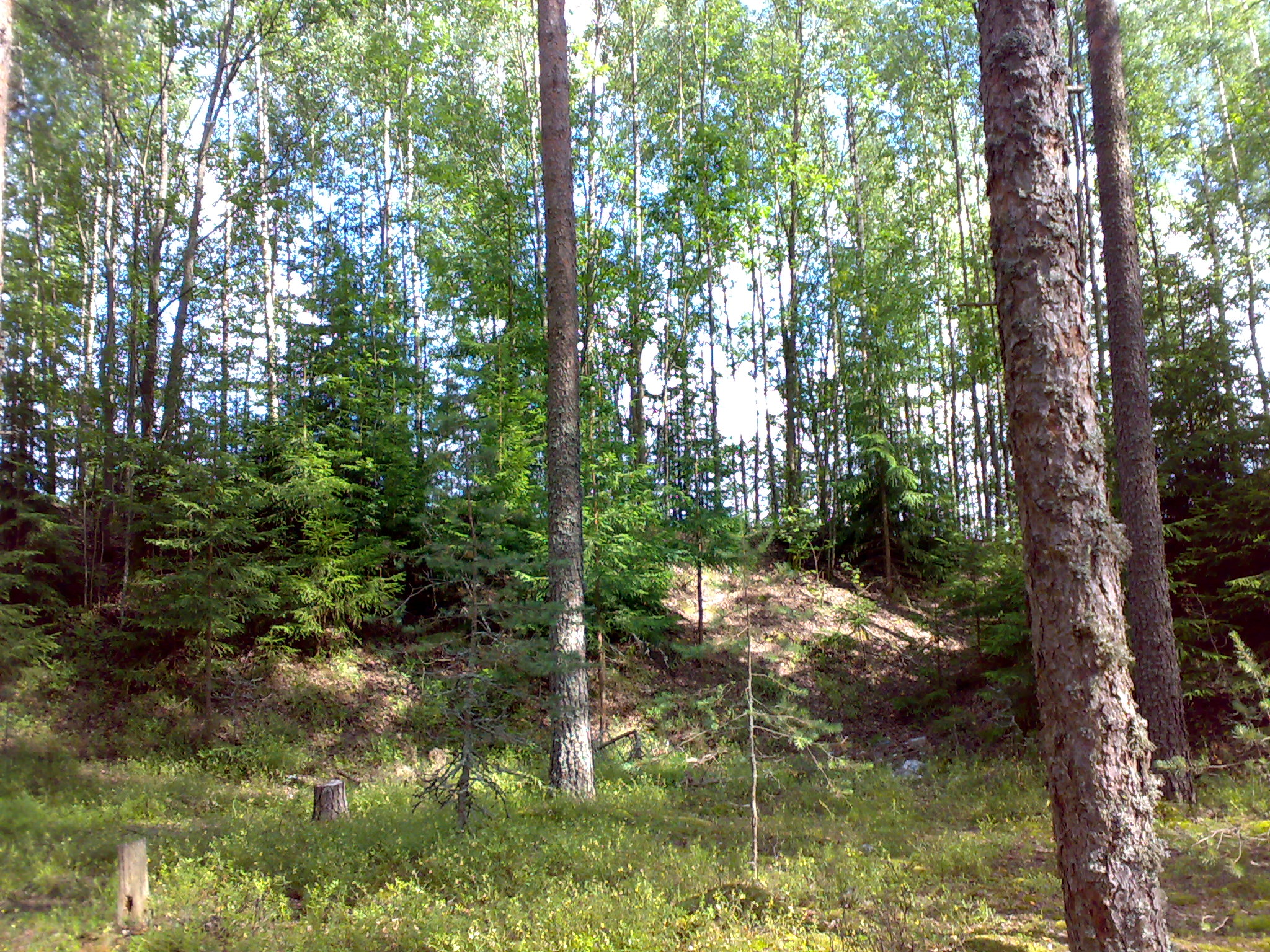 Forest